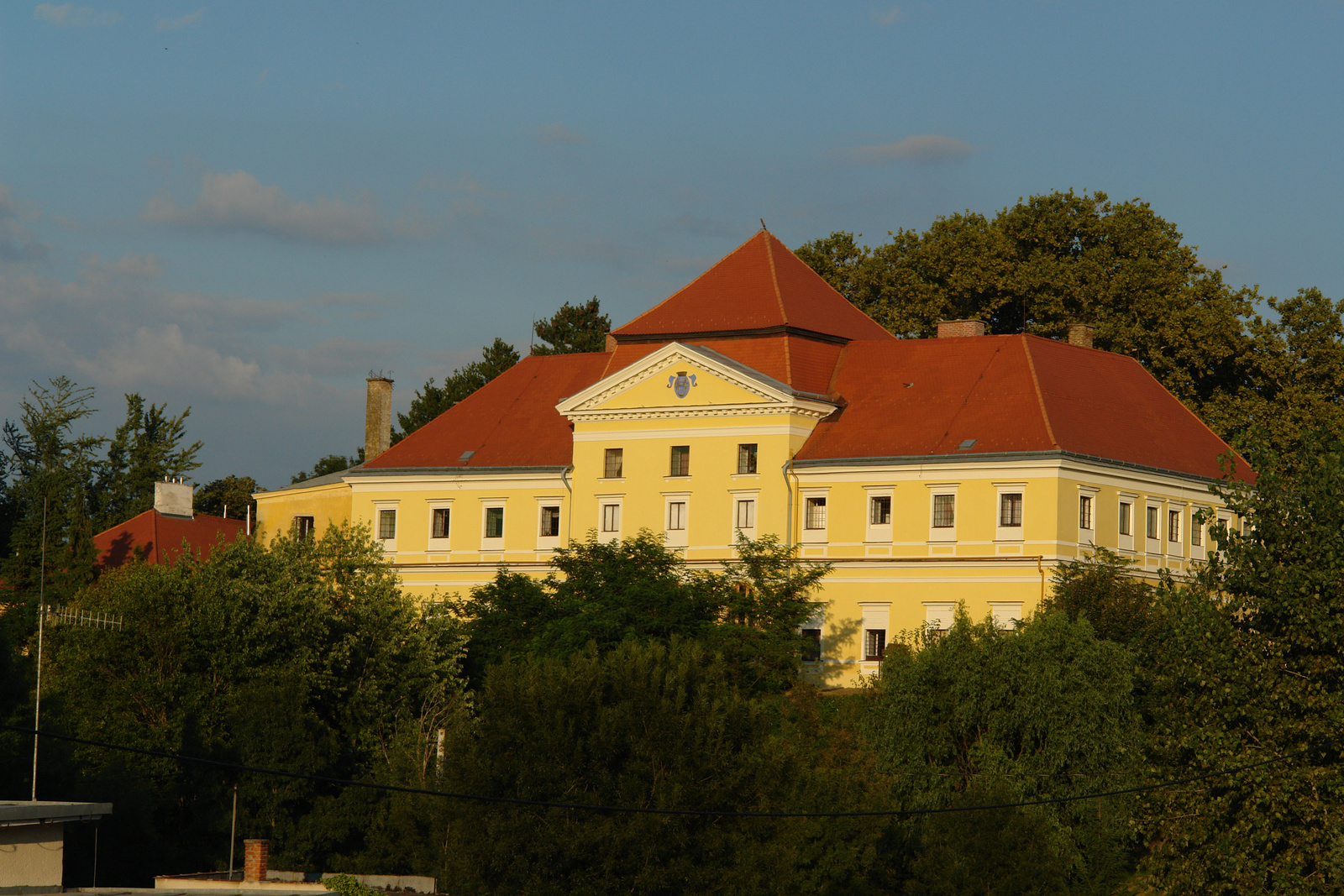 v. Festetich-kastély (Berzence, Szabadság tér 17 .) This is a photo of a monument in Hungary, Identifier: 7825